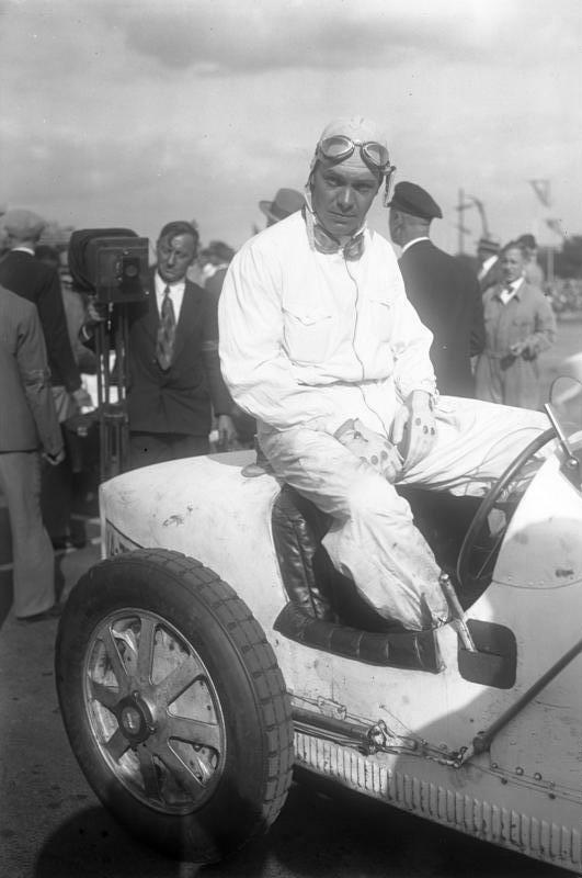 Der deutsche Rennfahrer von Morgen, auf dem Nürburgring tödlich verunglückt ! Der tödlich verunglückte Autorennfahrer Heinrich Joachim von Morgen.